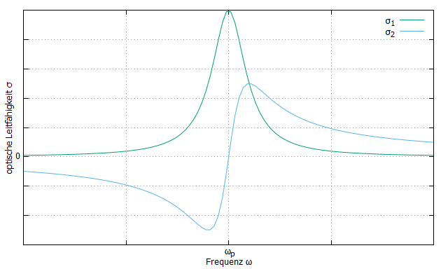 Sehr vereinfachte Darstellung für den Verlauf der optischen Leitfähigkeit nach Drude